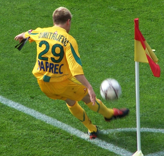 Corner de Milos Dimitrijevic à La Beaujoire